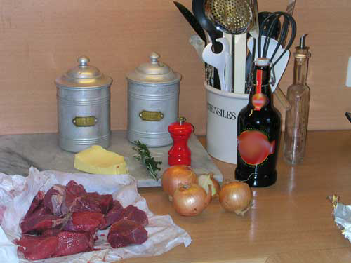 Ingrédients pour la carbonade flamande